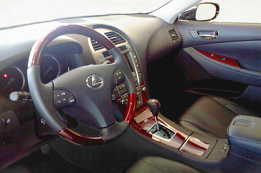 Lexus ES 350